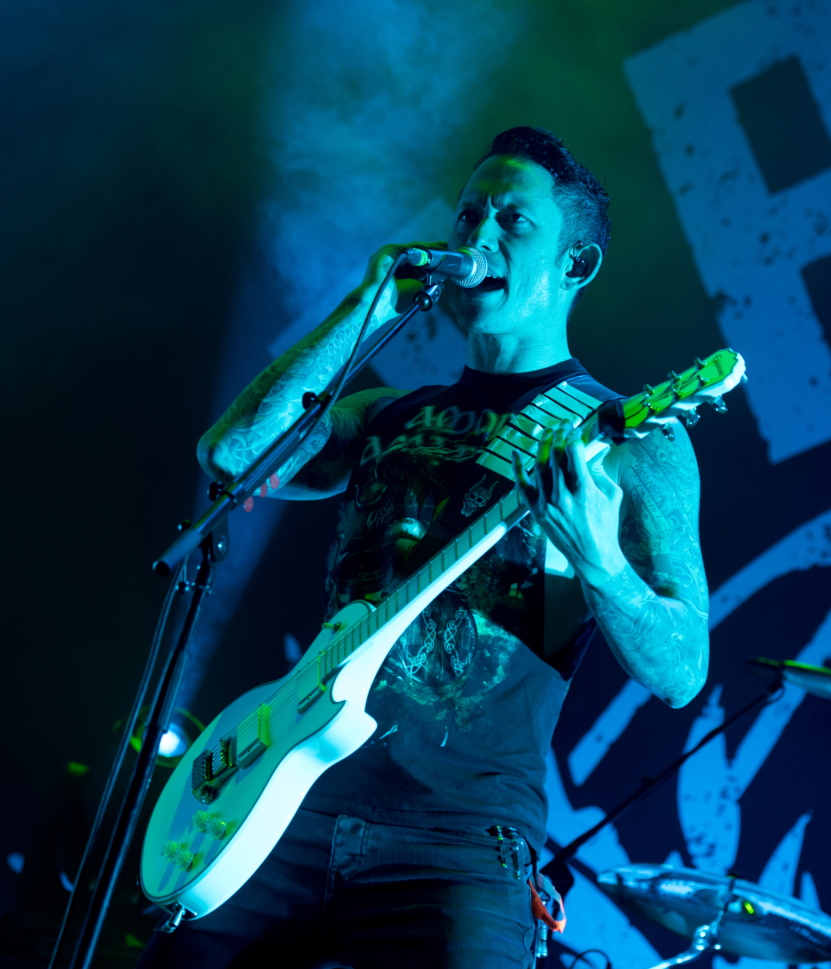 Trivium live beim Reload Festival 2017